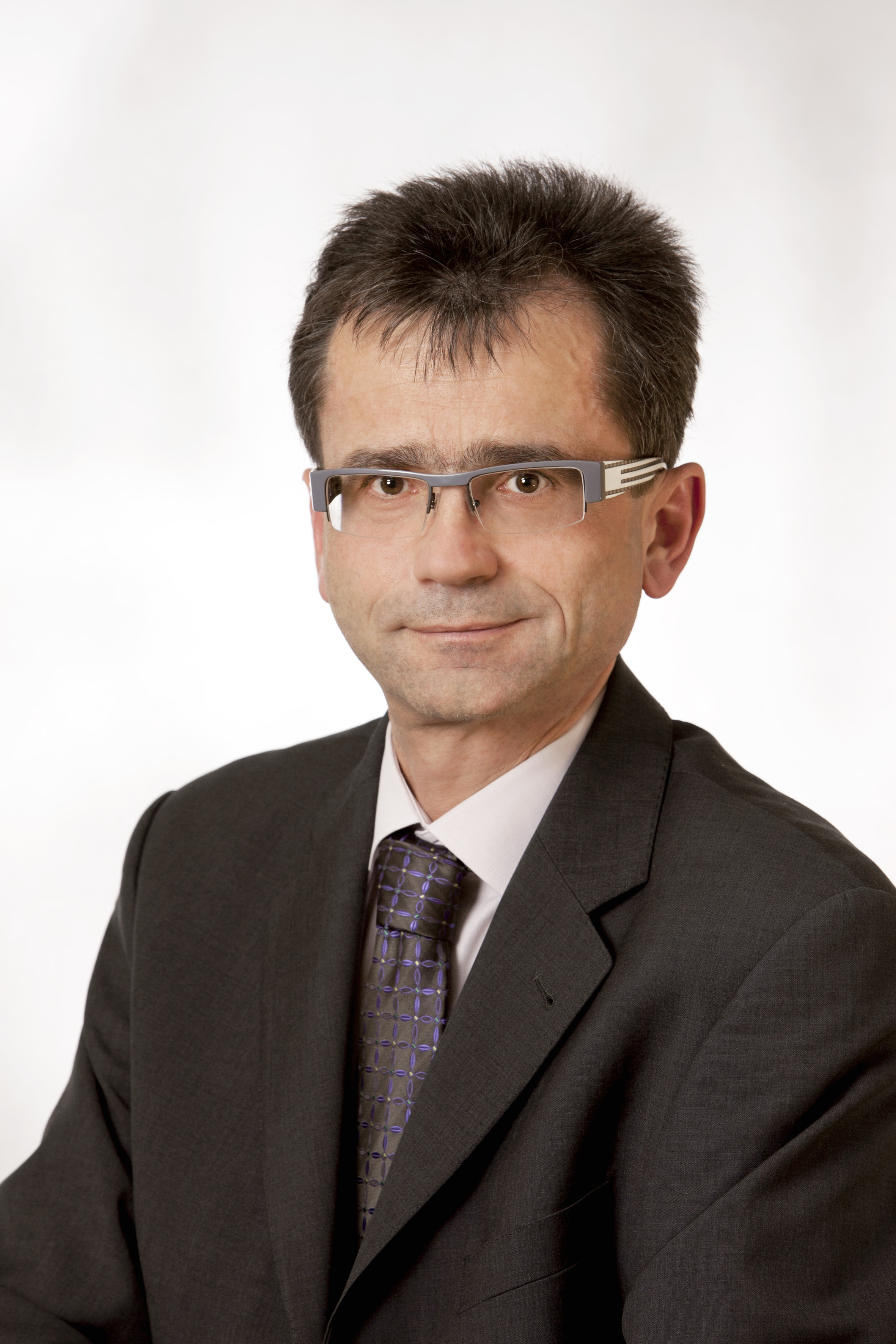 Dr. Peter Niedermoser